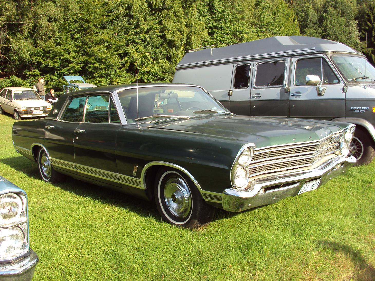 Ford LTD